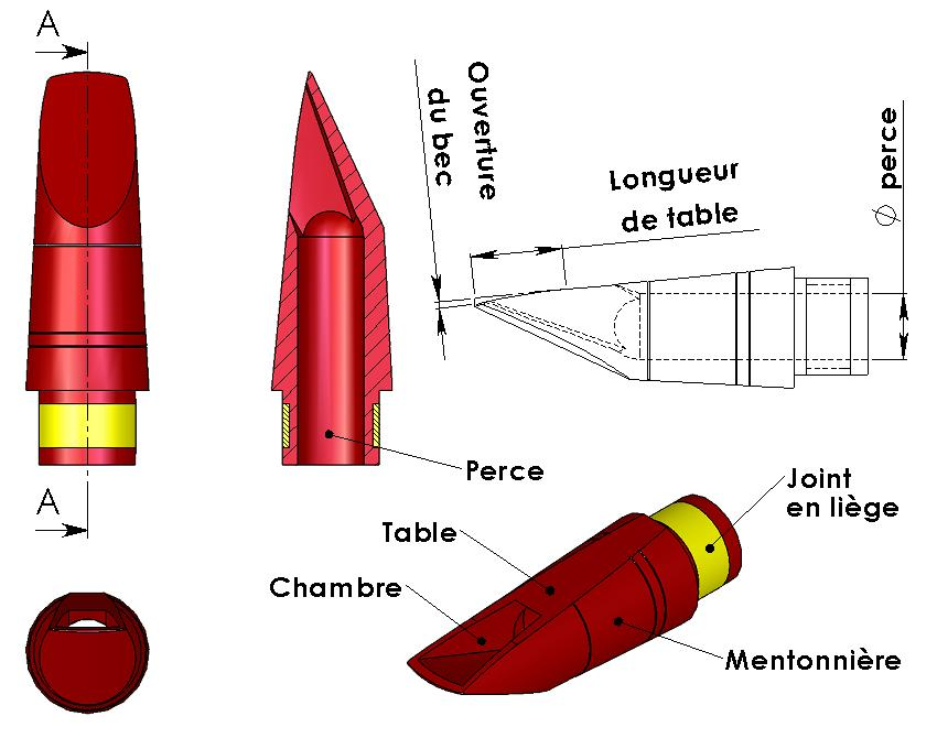 Plan détaillé et commenté d'un bec de clarinette réalisé avec solidworks